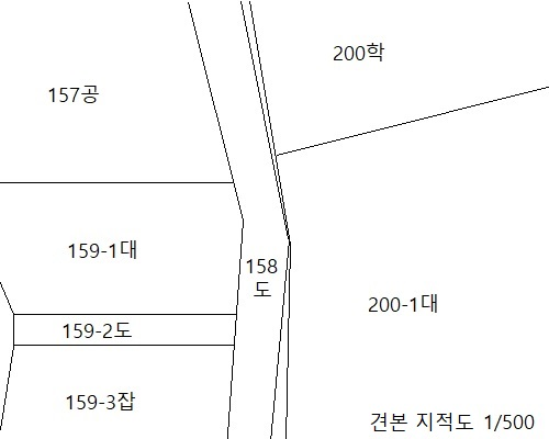 대한민국에서 사용되는 지적도의 형태를 만들었습니다. 실제 지적도가 아닌 가상으로 만든 지역의 지적도입니다.